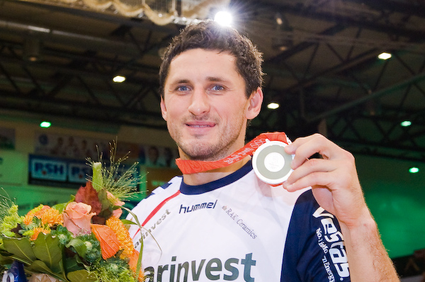 Alexander Petersson mit seiner Silbermedaille (Olympia 2008)